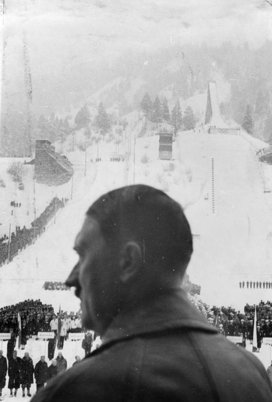 Eröffnung der IV. Winterolympiade. Der Führer eröffnet die Winterolympiade